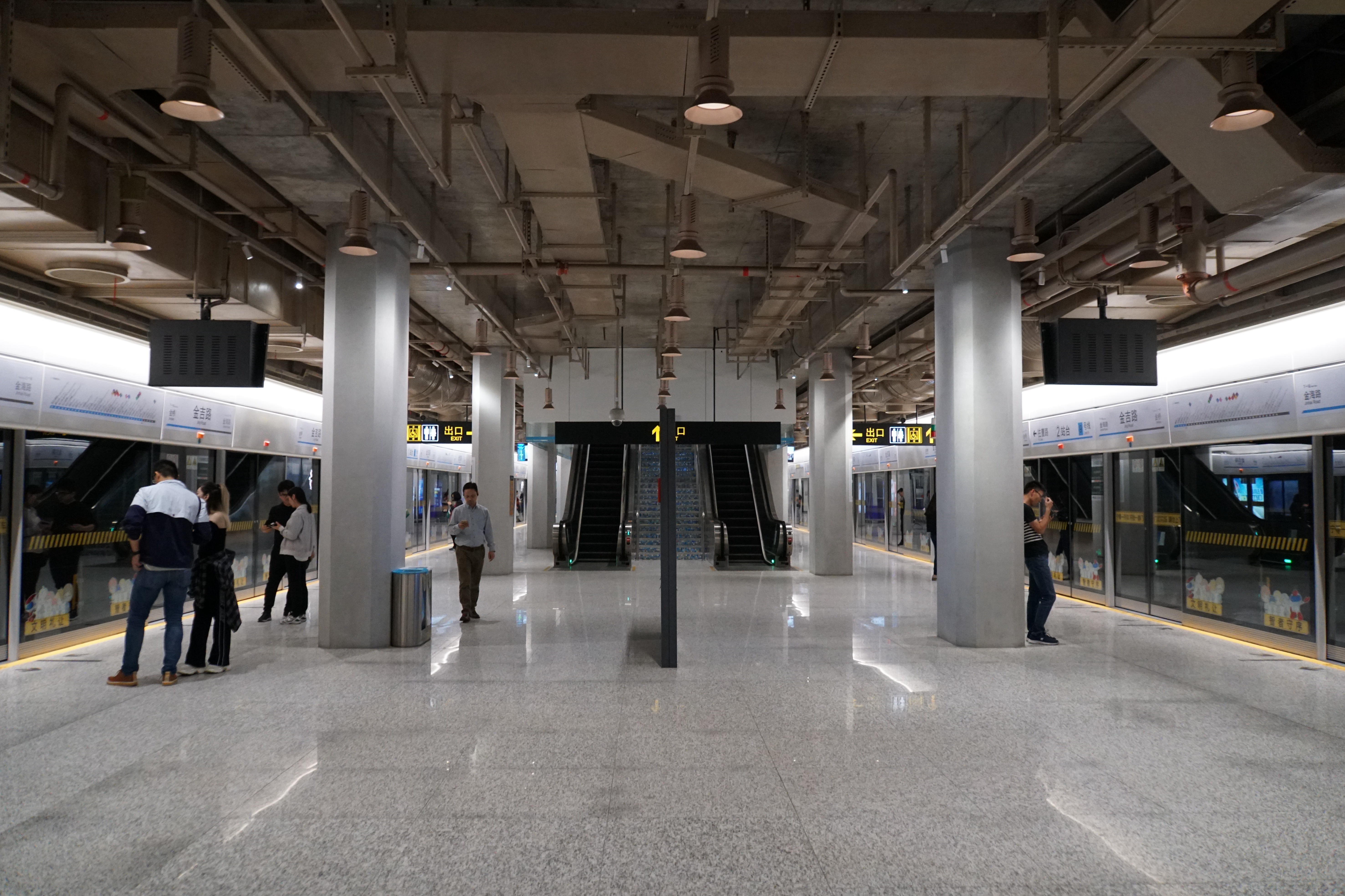 金吉路站站台